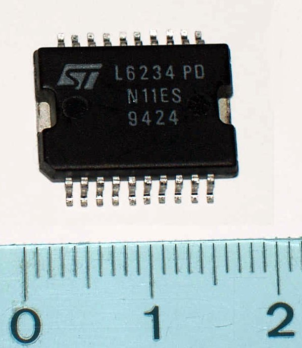 DIL-SMD-Gehäuse